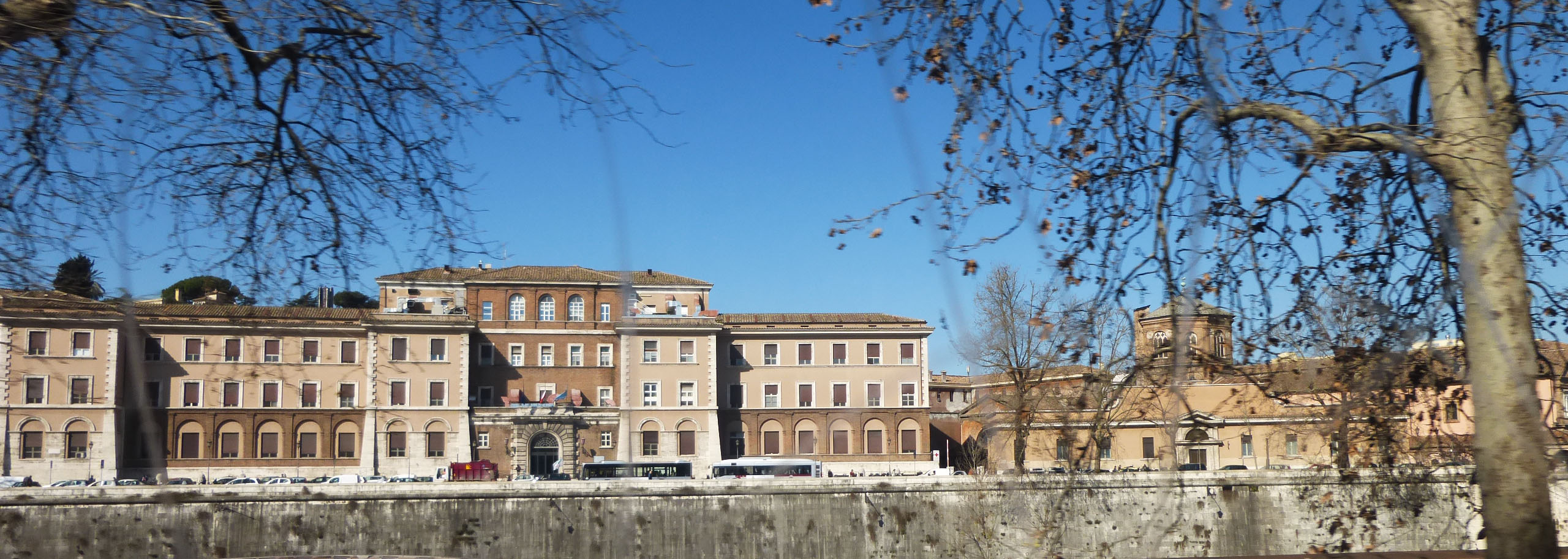 Roma, lungotevere in Sassia, moderno ospedale di S. Spirito e antico Arcispedale.